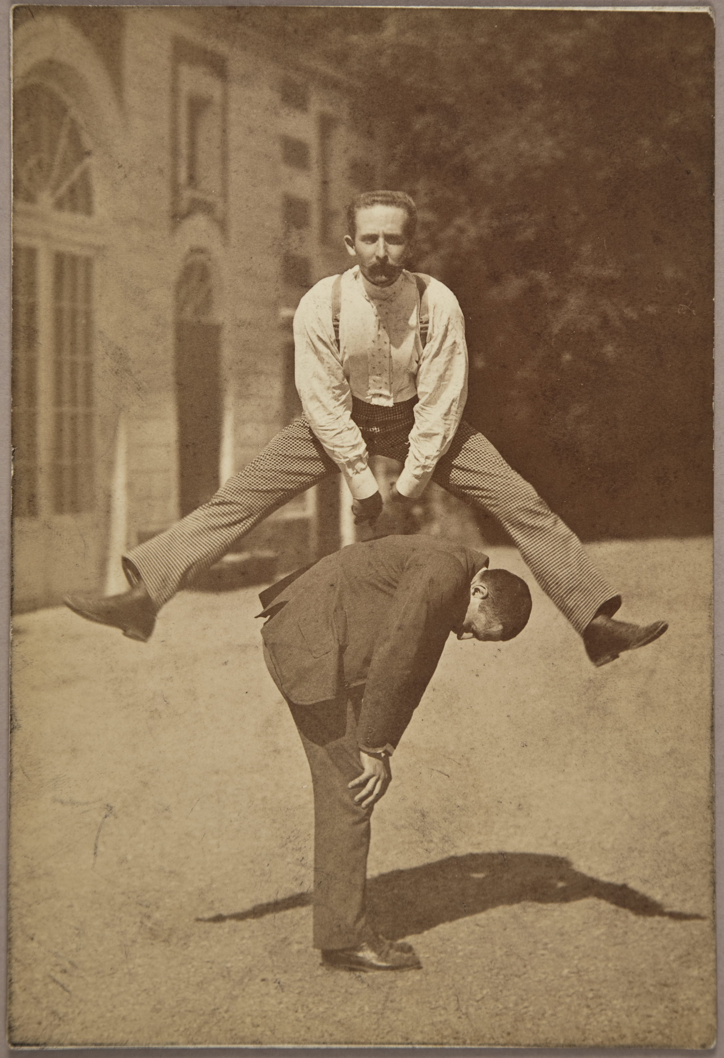 Photographie d'octobre 1914 avec Elie Debidour